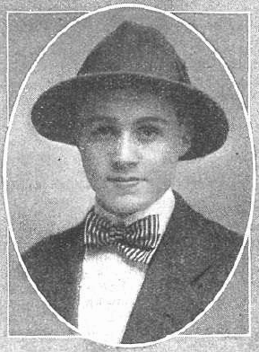 Fotografía del escritor español Álvaro Retana publicada en 1913 con motivo de la publicación de su libro Rosas de juventud